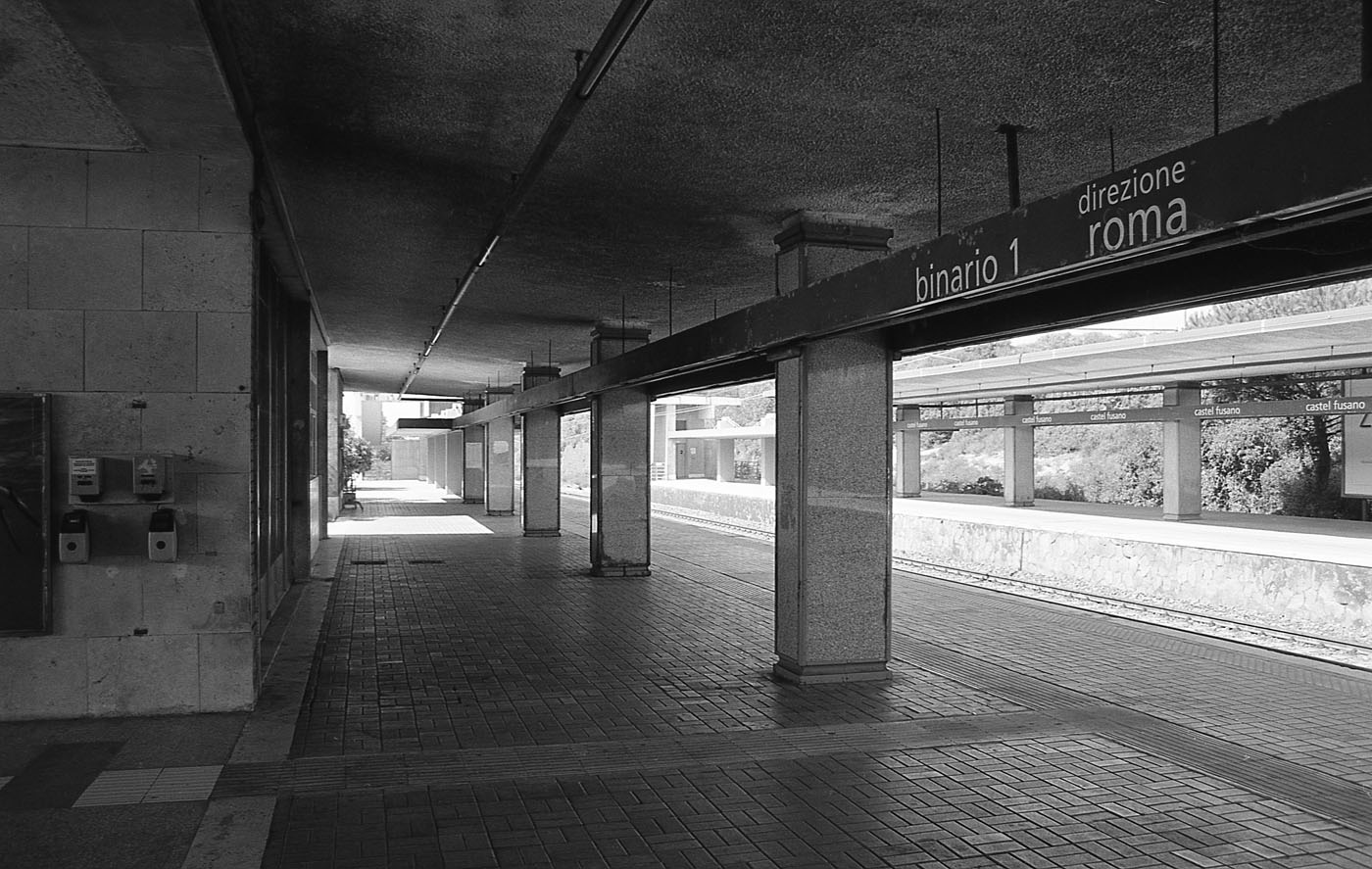 La stazione di Castefusano (2003)